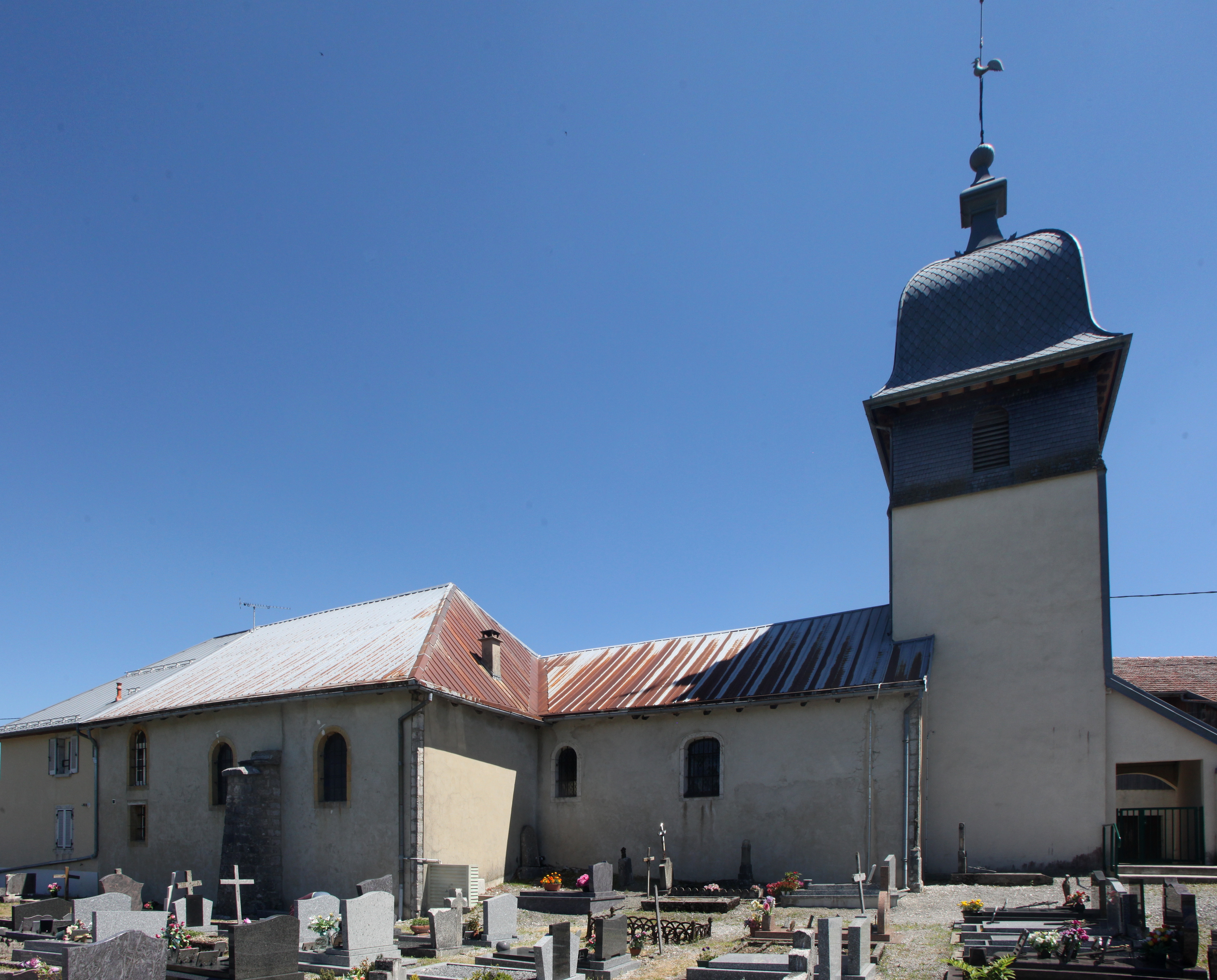 Église d'Arsure-Arsurette (Jura).